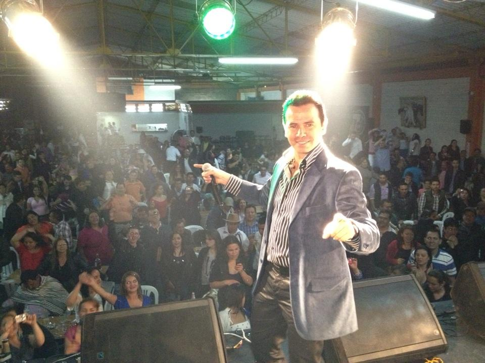 Jhonny Rivera